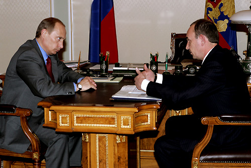 НОВО-ОГАРЕВО. Губернатор Сахалинской области Иван Малахов на рабочей встрече с Президентом Российской Федерации Владимиром Путиным.